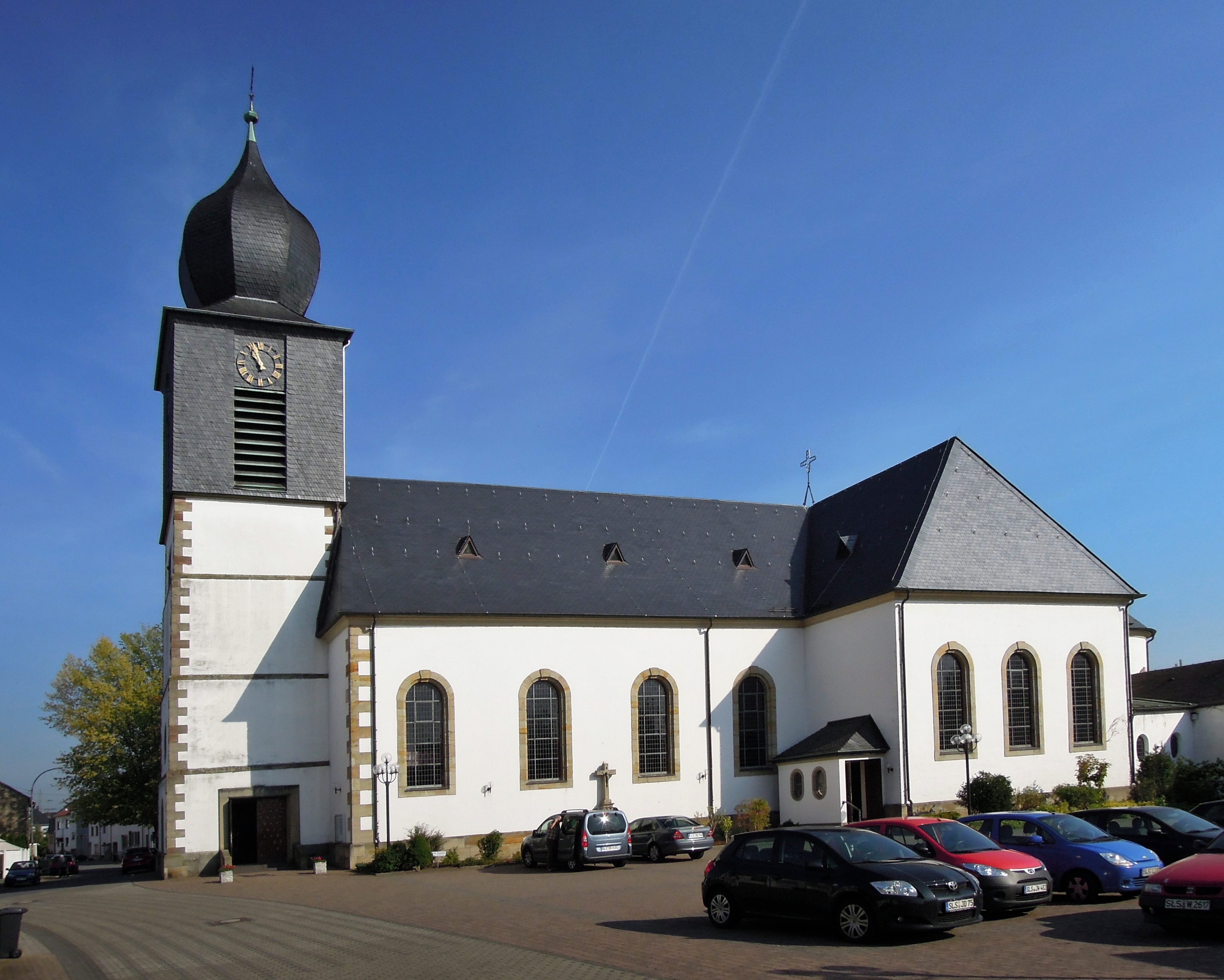 Kleinstraße, Pfarrkirche St. Crispinus und St. Crispinianus(Einzeldenkmal)